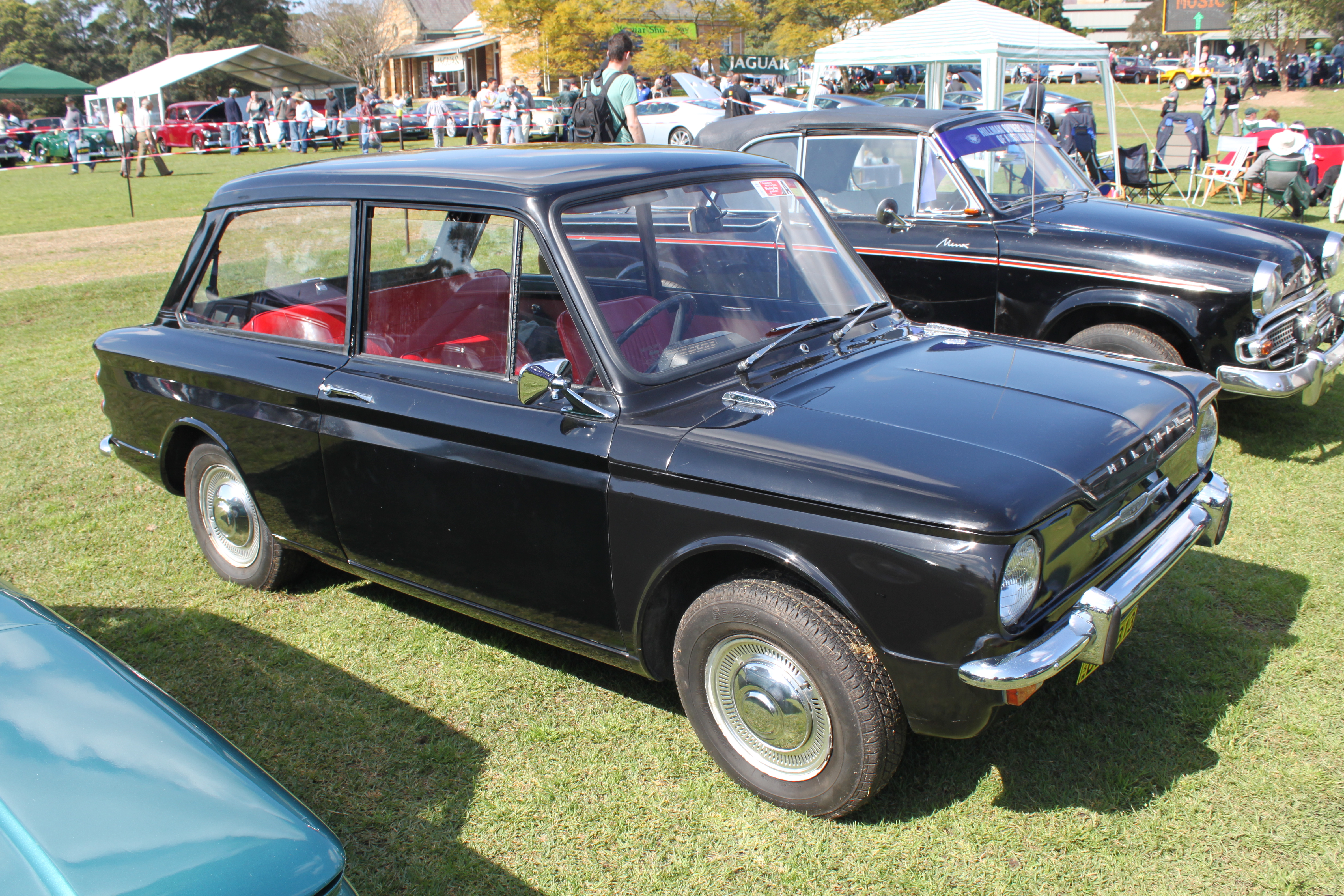 Hillman Imp